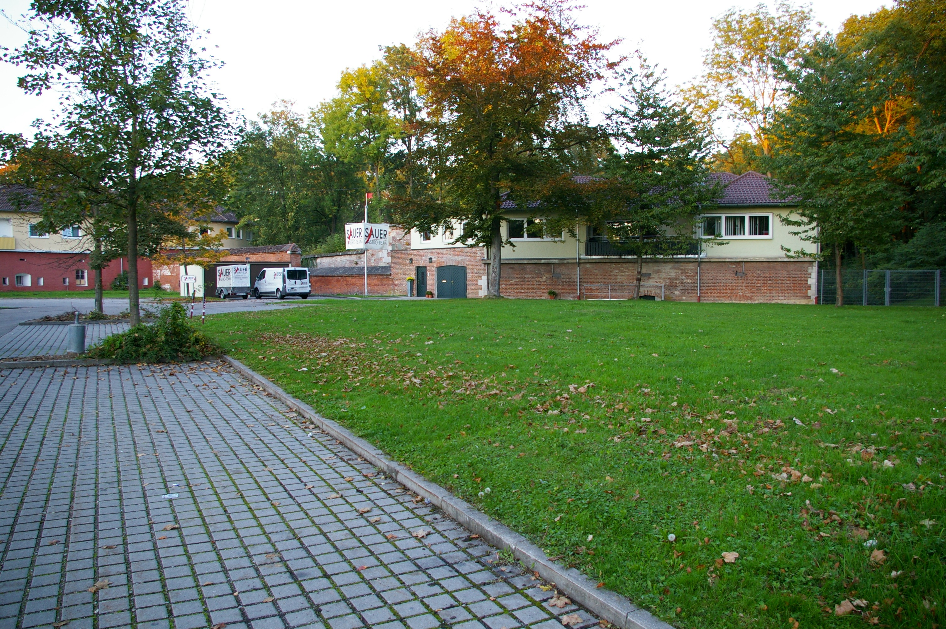 Rechte Seite des Vorwerks Schwaighofen